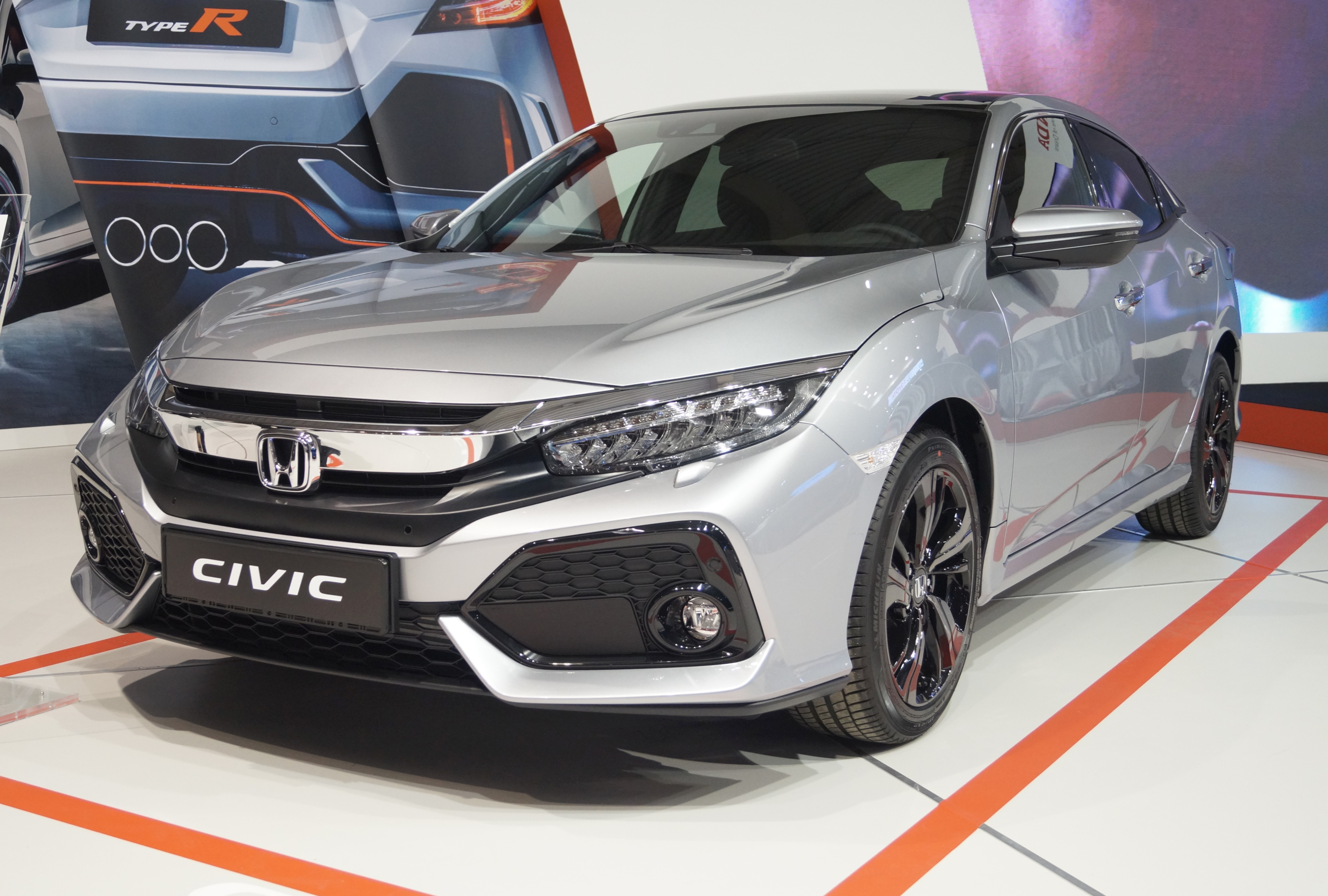 Lewy przód Hondy Civic 5D na Motor Show Poznań 2017.